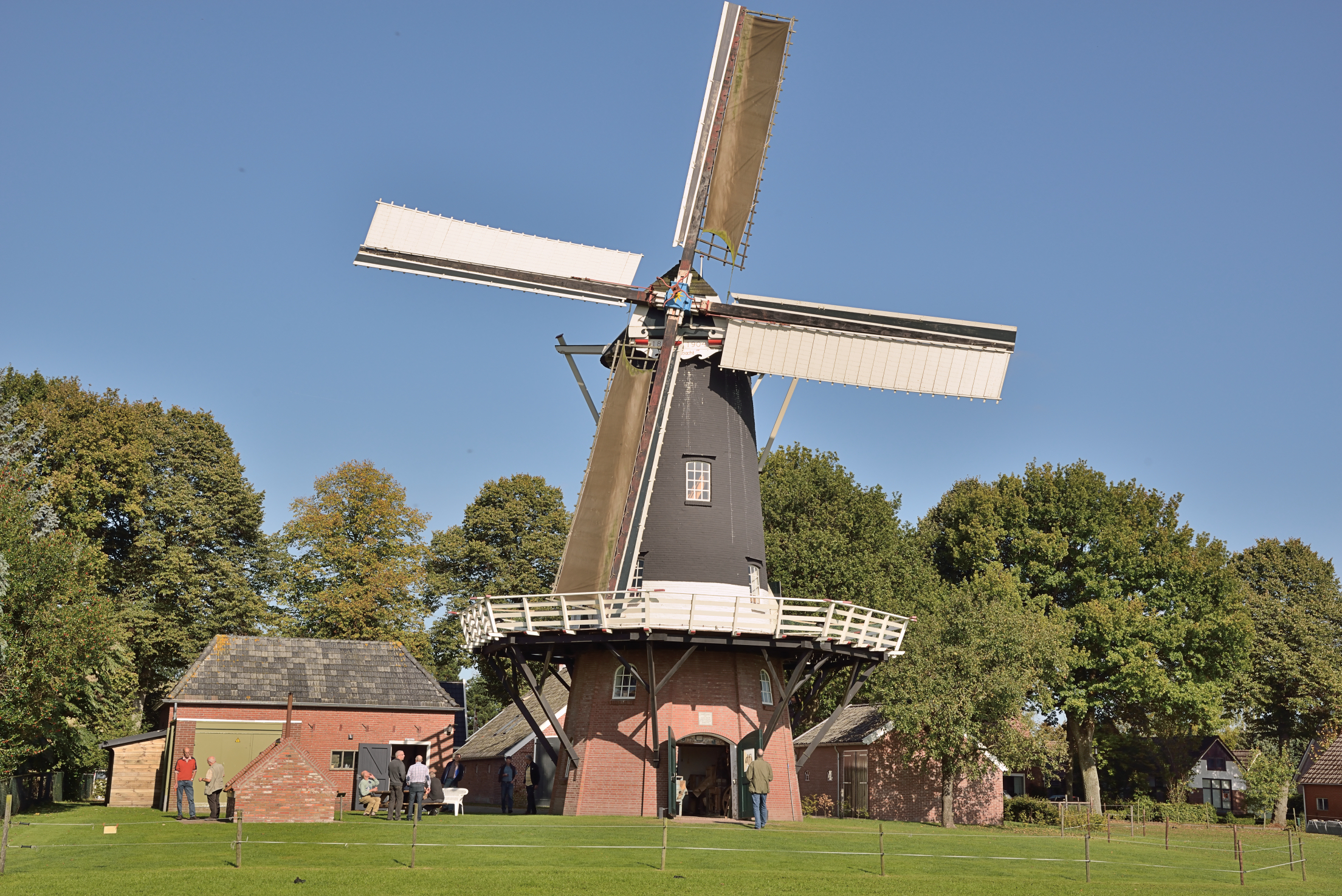 De Eendracht, Gieterveen